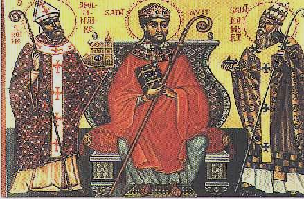 Mamertus (rechts) mit Apollinaris von Valence (links) und Avitus von Vienne (Mitte).